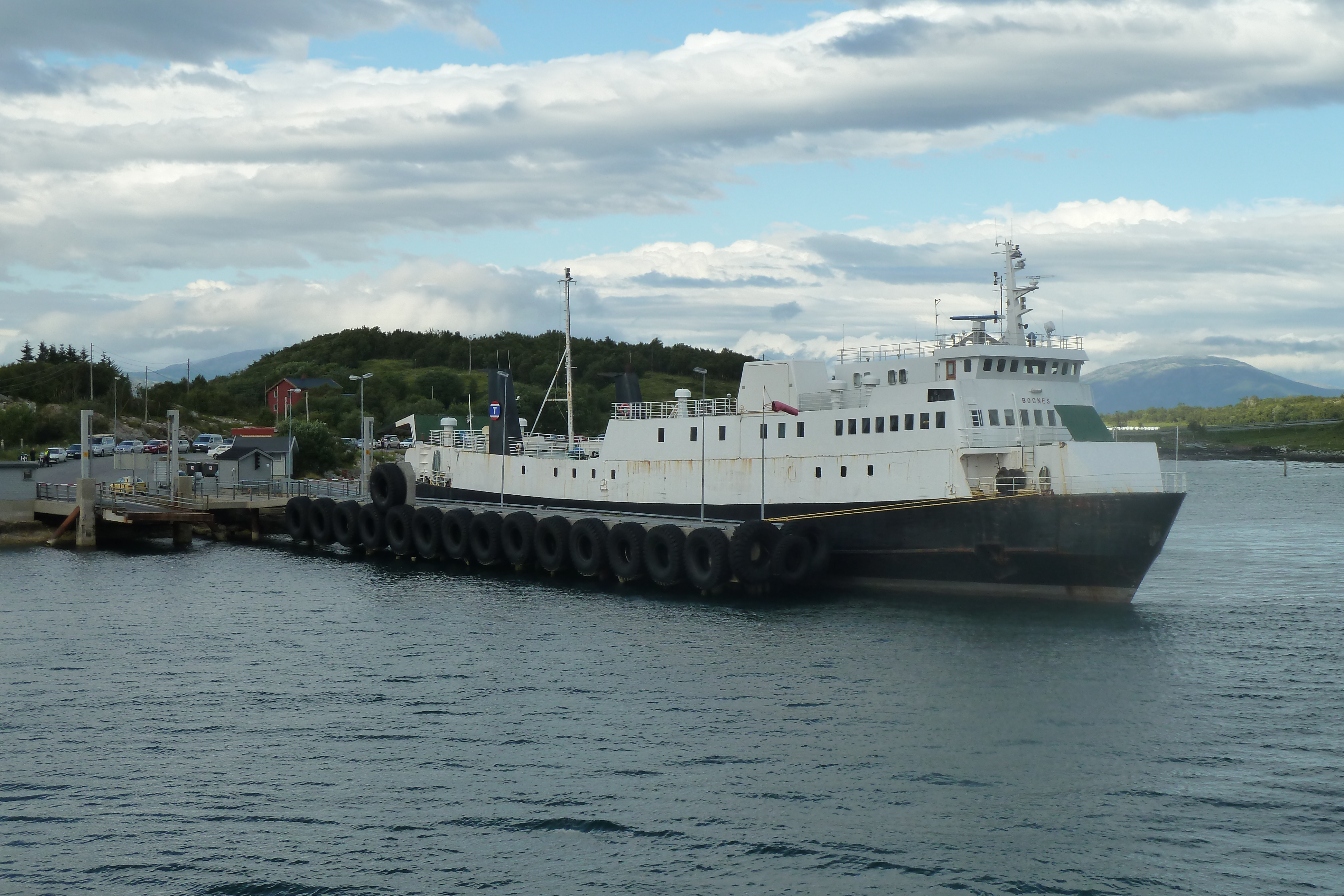 MF 'Bognes' (IMO 7608758) til kai i Holm, Bindal.